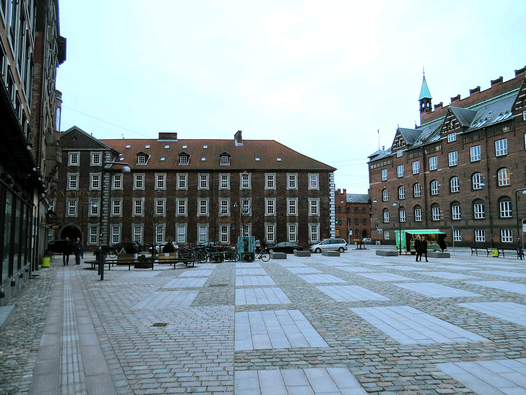 Regnbuepladsen i København, ved Københavns Rådhus og Vester Voldgade